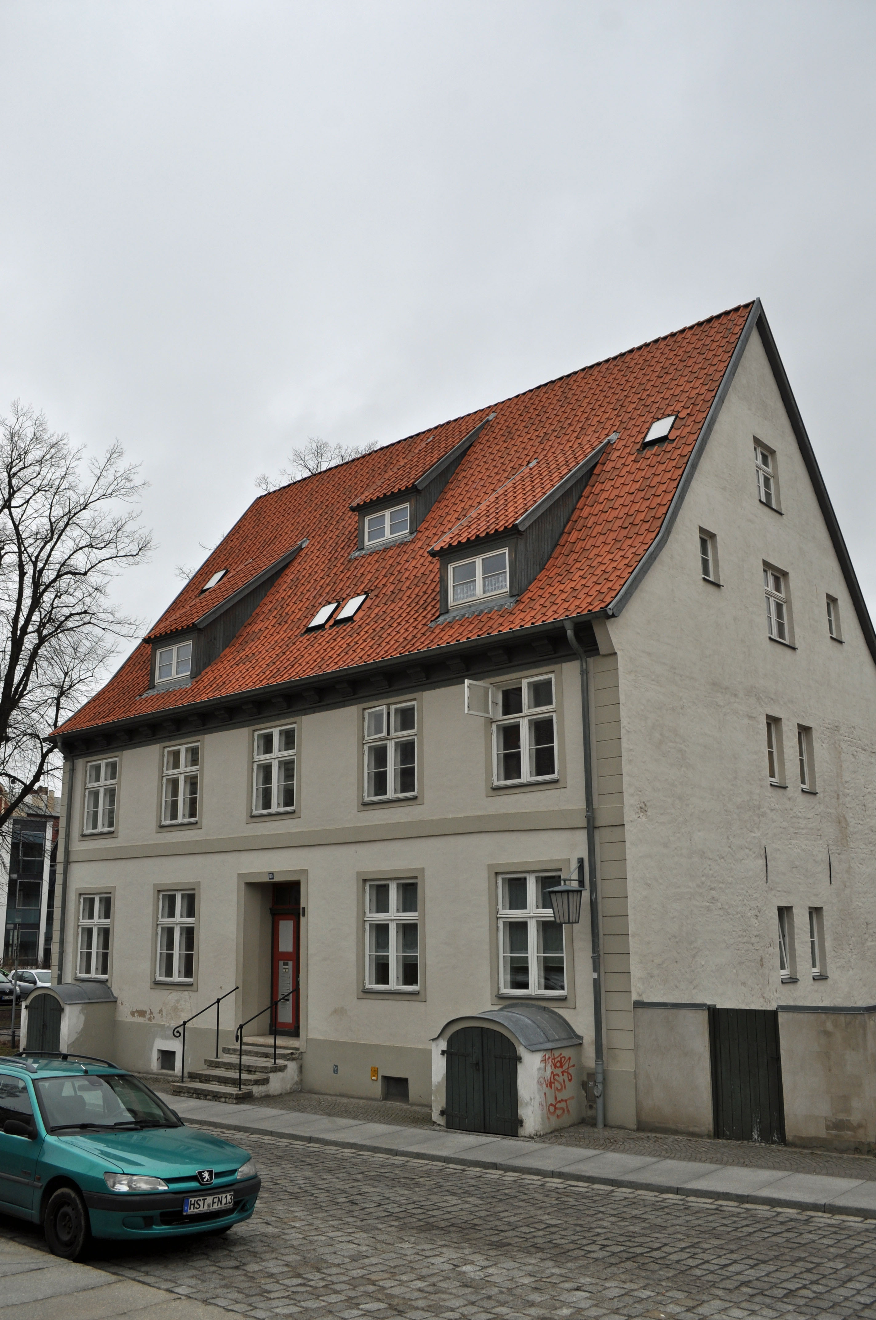 Gebäude bzw. Gebäudedetail in Stralsund. Straße und Hausnummer siehe Dateiname.